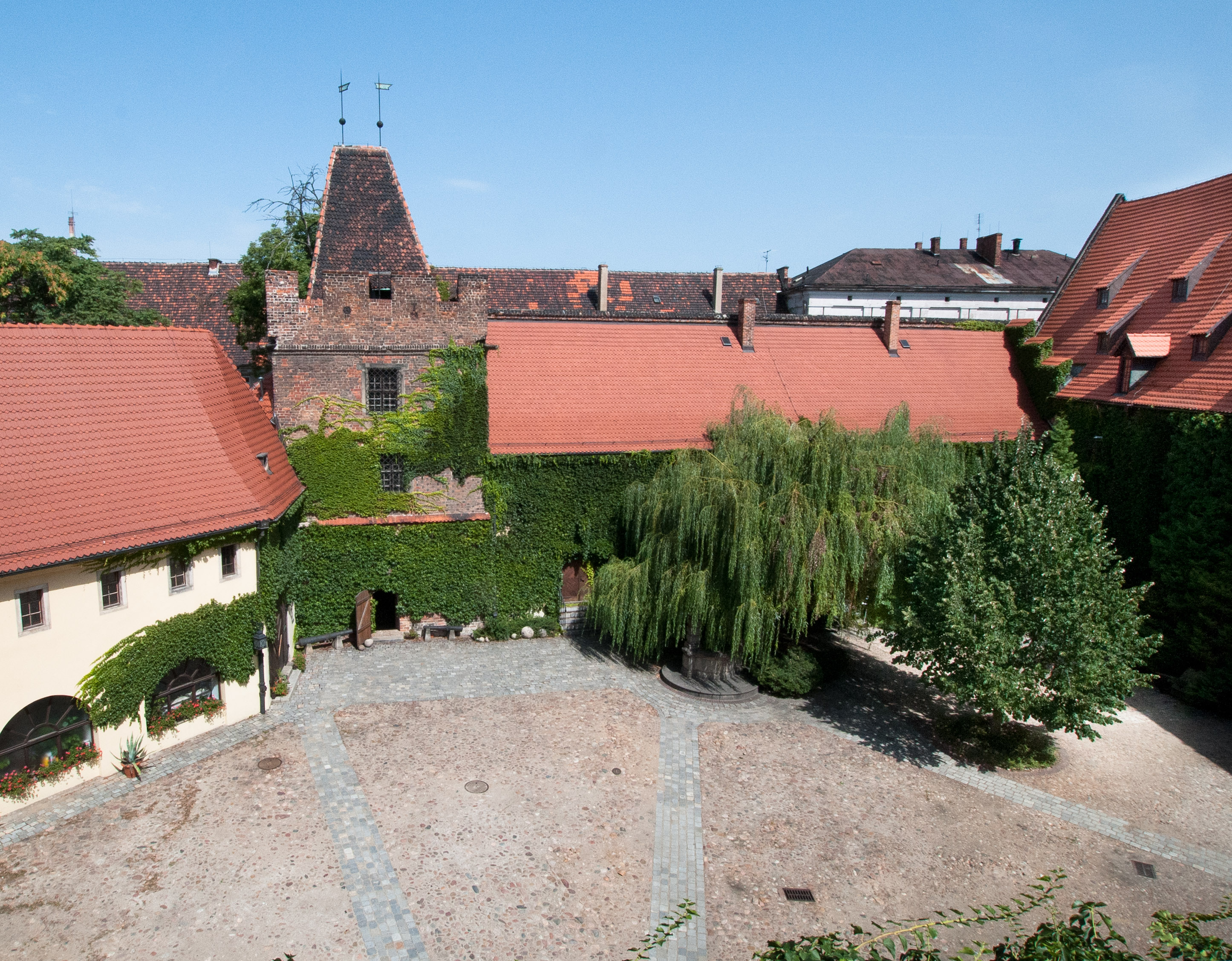 Arsenał Miejski, ul. Cieszyńskiego 9, Wrocław, Dziedziniec